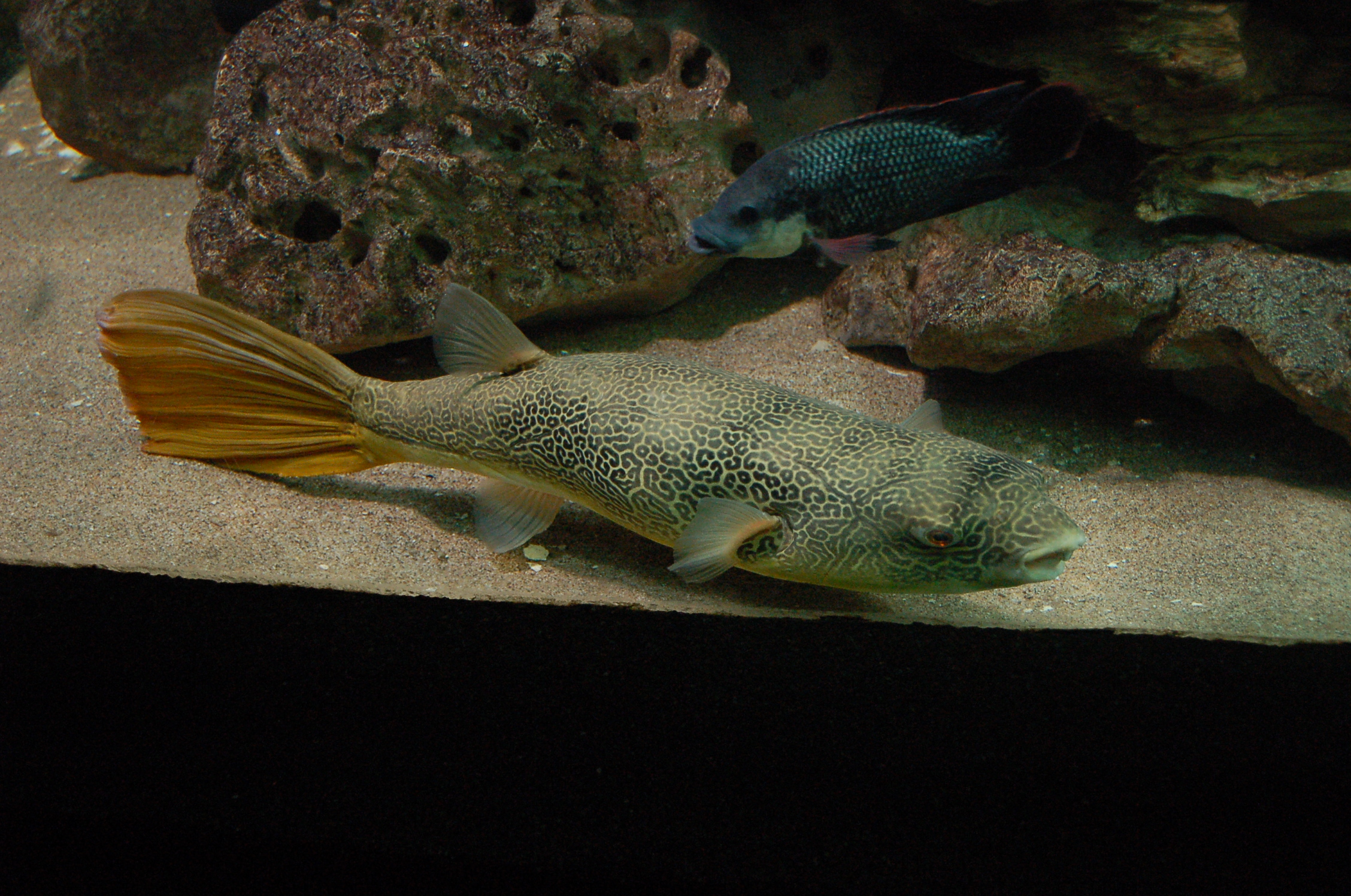 Poisson ballon géant - Tetraodon mbu Aquarium tropical du Palais de la Porte Dorée. Paris. France.